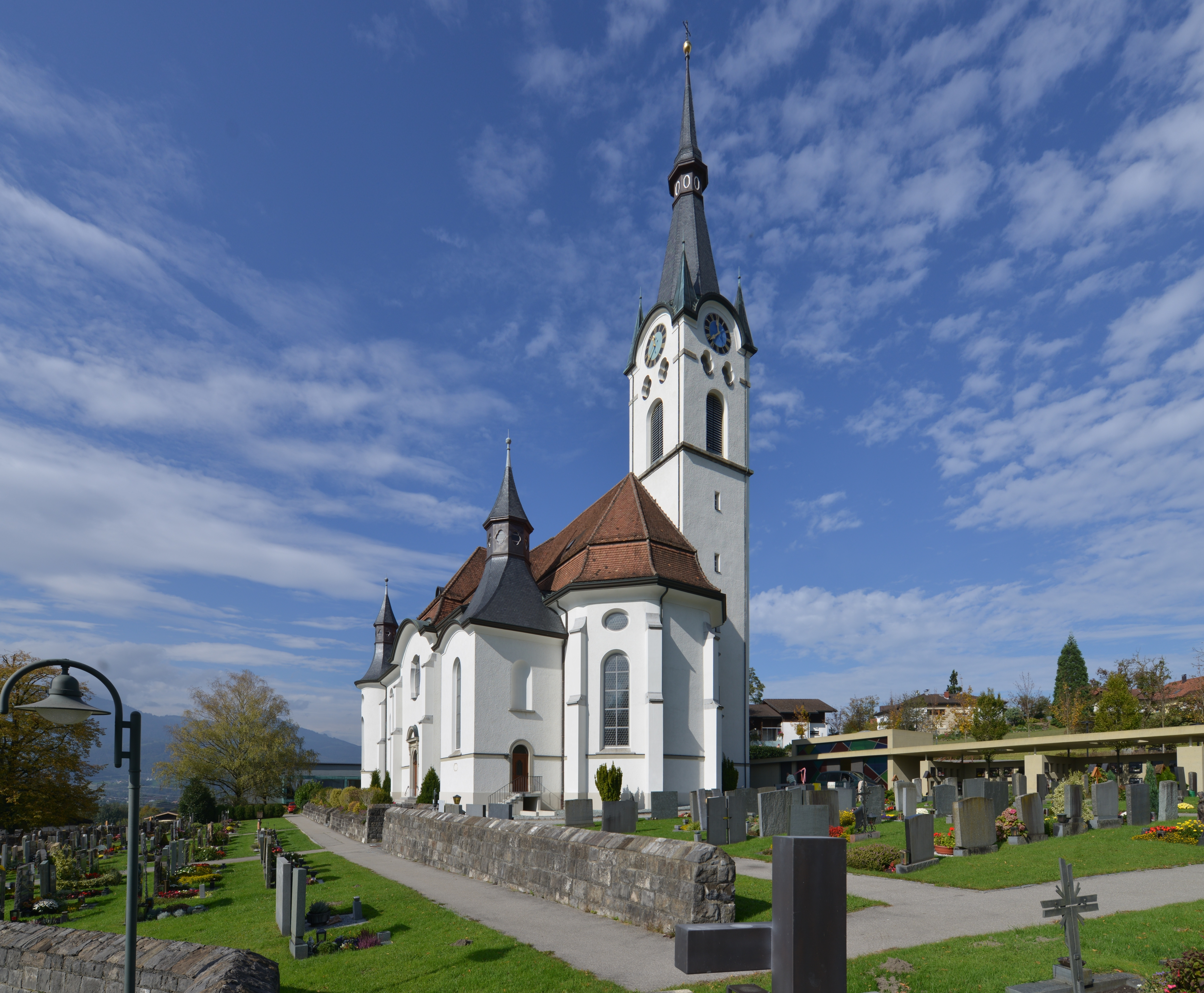 Pfarrkirche Hl.Kilian, 1905-1907 erbaut nach Plänen von Albert Rimli im Neobarock. Koblach, Vorarlberg